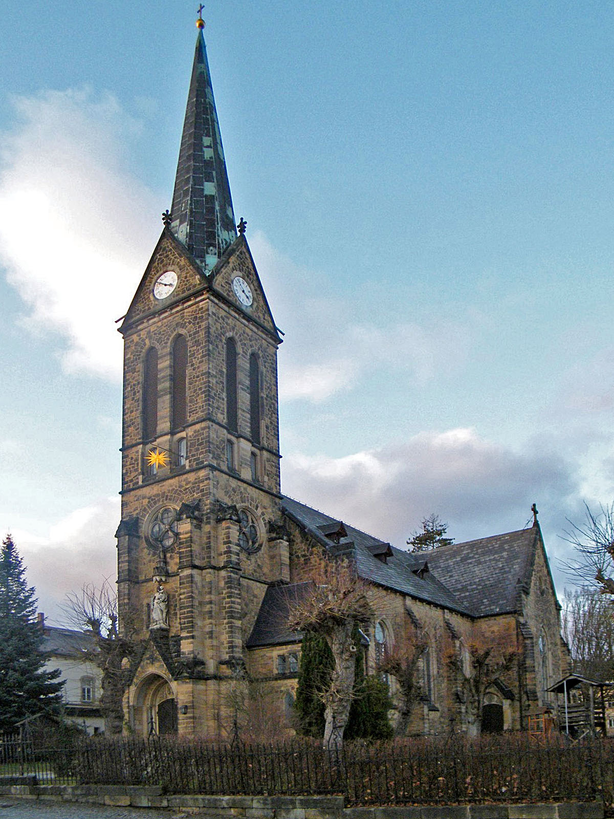 Kreuzerhöhungskirche in Sebnitz